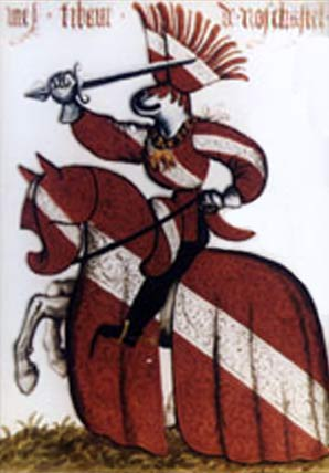 Armorial équestre de la Toison d’Or 1430-1461: Thiébaut VIII